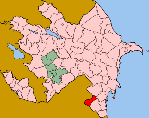 Map of Azerbaijan showing Yardymli (Yardımlı) rayon.